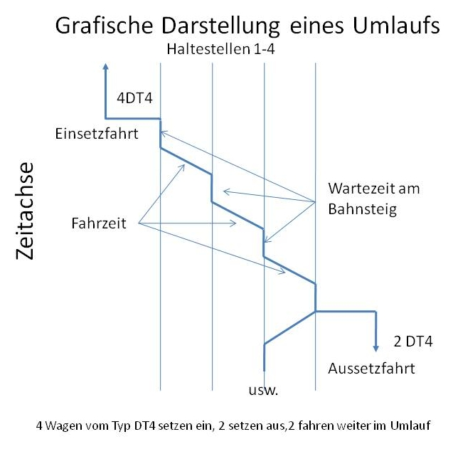 Grafische Darstellung eines Fahrzeugumlaufes